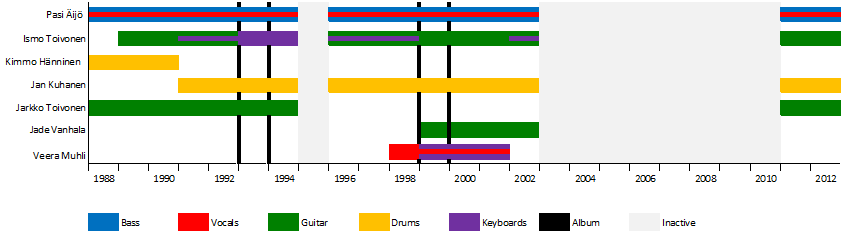 Bändin jäsenten aikajana.